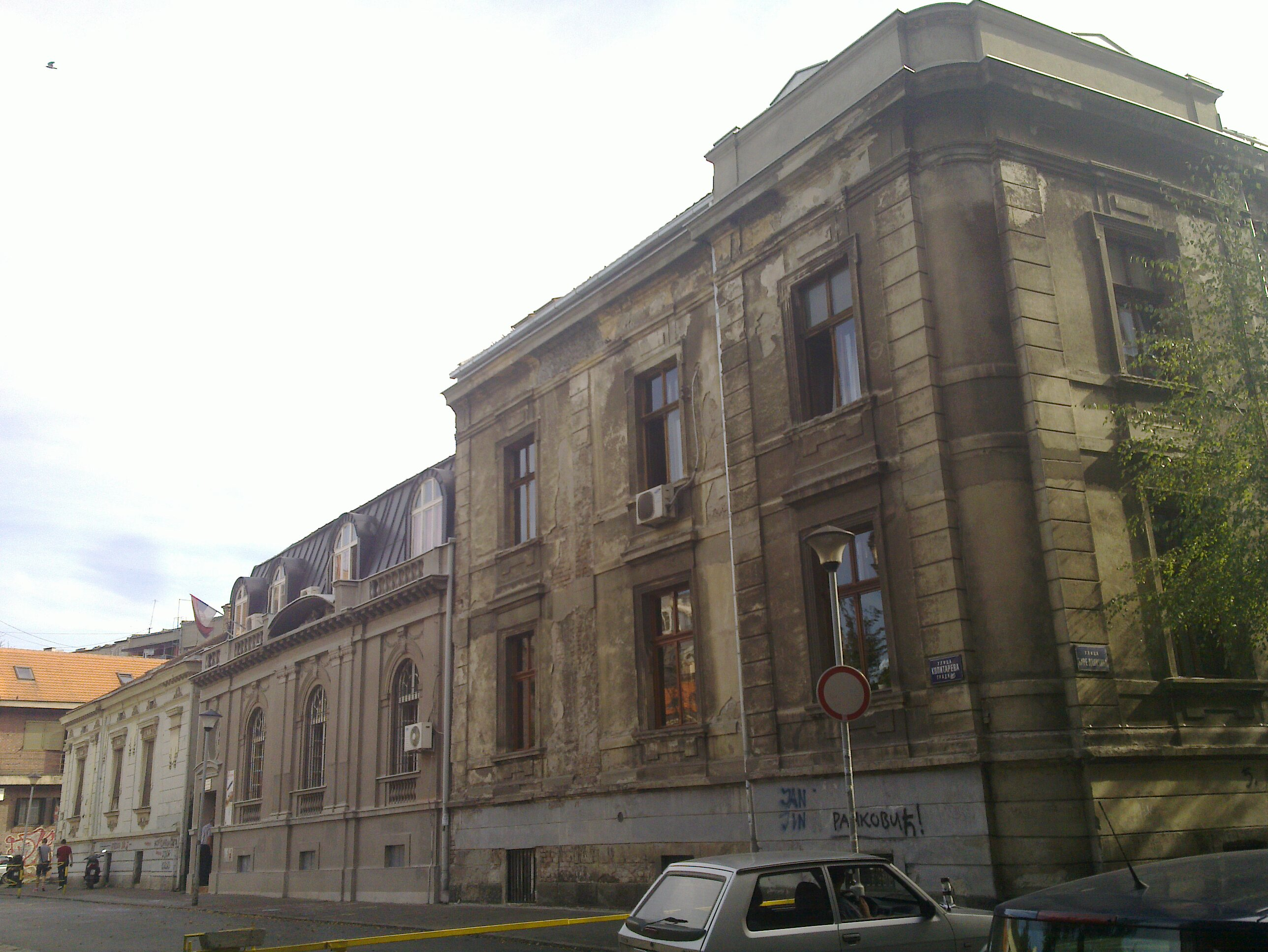 Kopitareva gradina je trg u Beogradu, kao i kraj grada u neposrednoj okolini trga, u opštini Stari grad. Kopitareva gradina se nalazi u istočnom delu opštine, na prostoru ograničenom ulicama Džordža Vašingtona, Hilandarskom, Šafarikovom, Đure Daničića, Jalene Ćetković, Bulevarom despota Stefana, i samim trgom Kopitareva gradina.